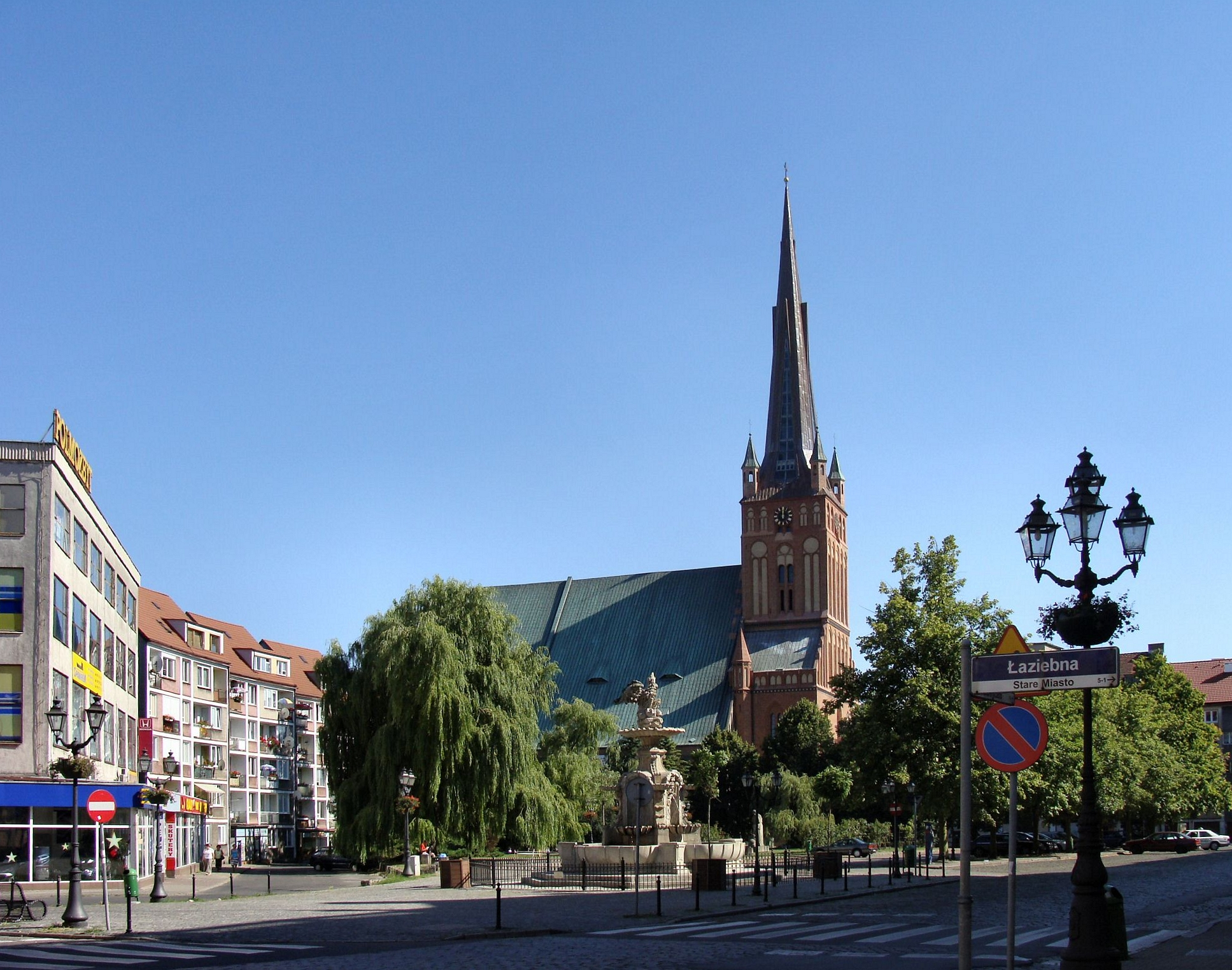 Plac Orła Białego w Szczecinie